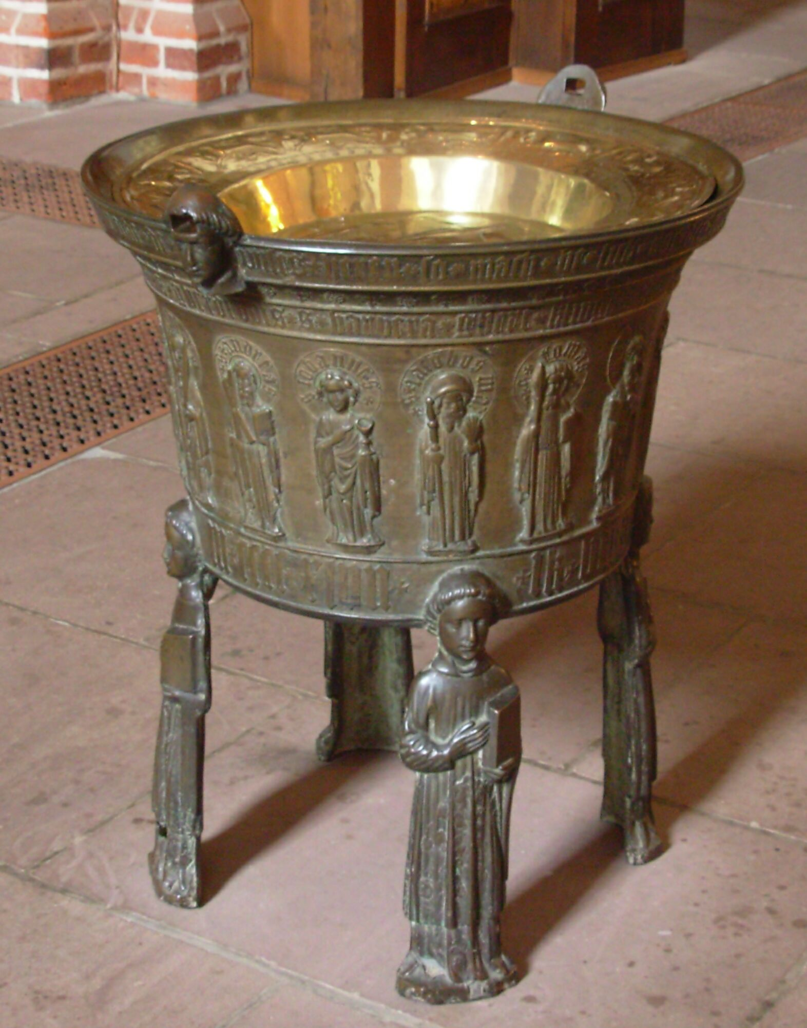 Taufbecken in der Marienkirche Segeberg